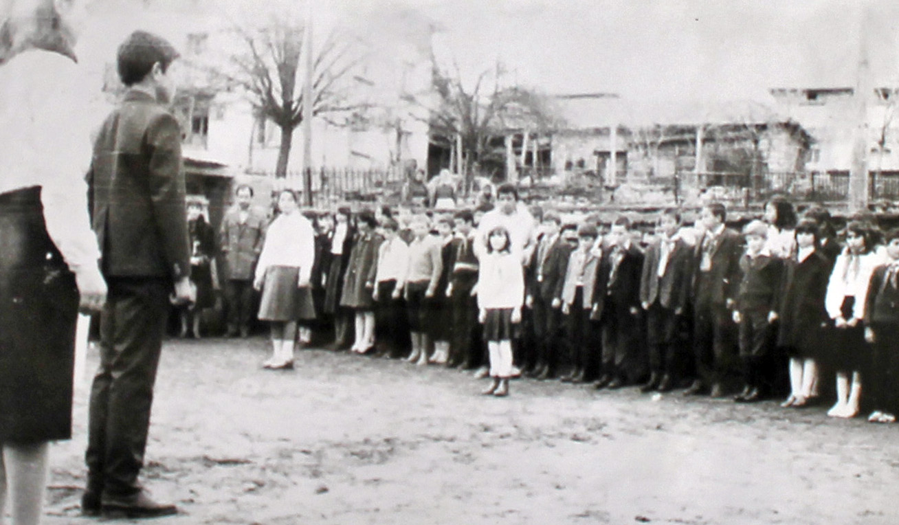 Ученици от ОУ „Св. Св. Кирил и Методий” - с. Туховища отбелязват датата 3-ти март с празнично настроение.